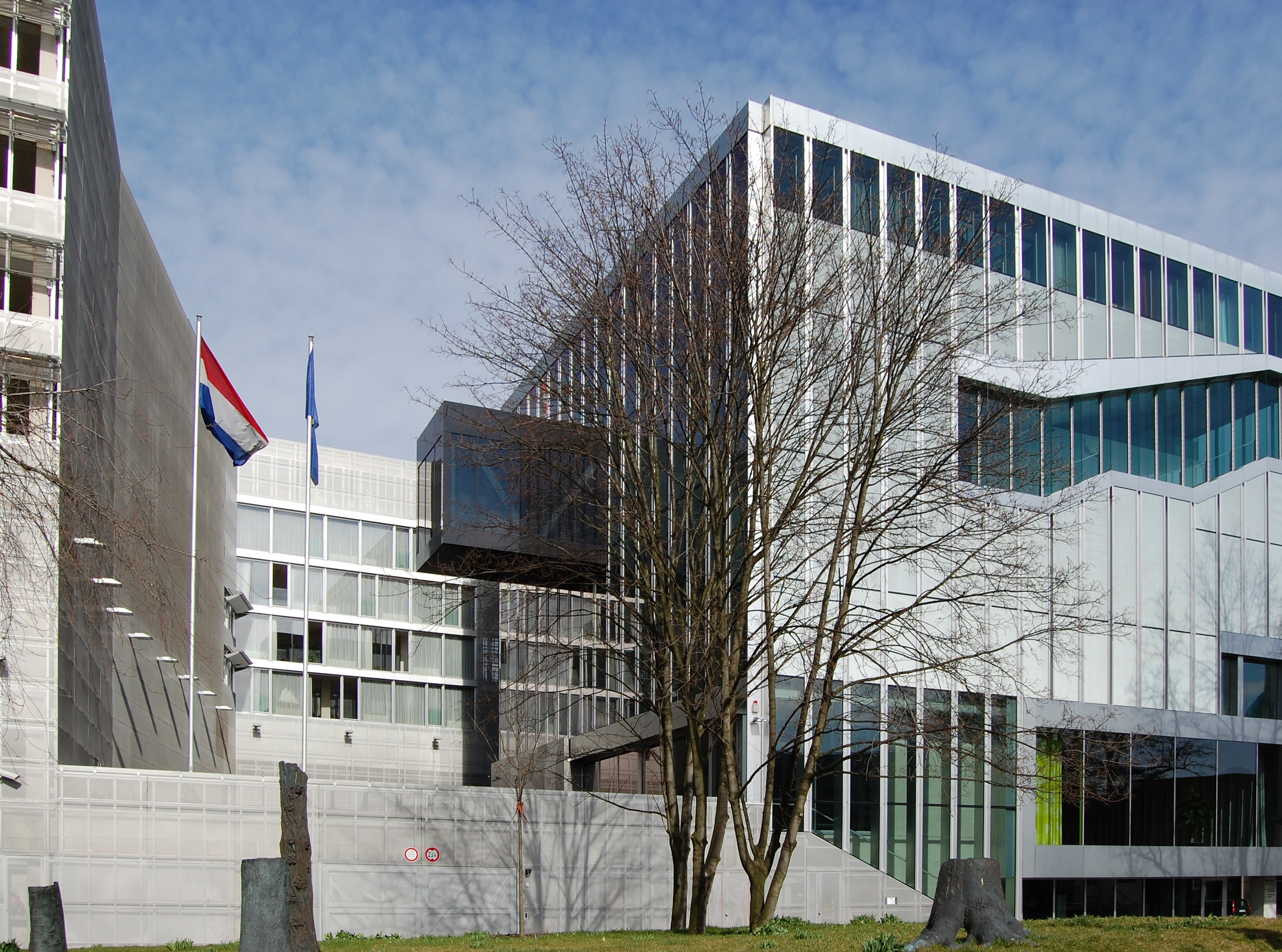 Dutch Embassy in Berlin